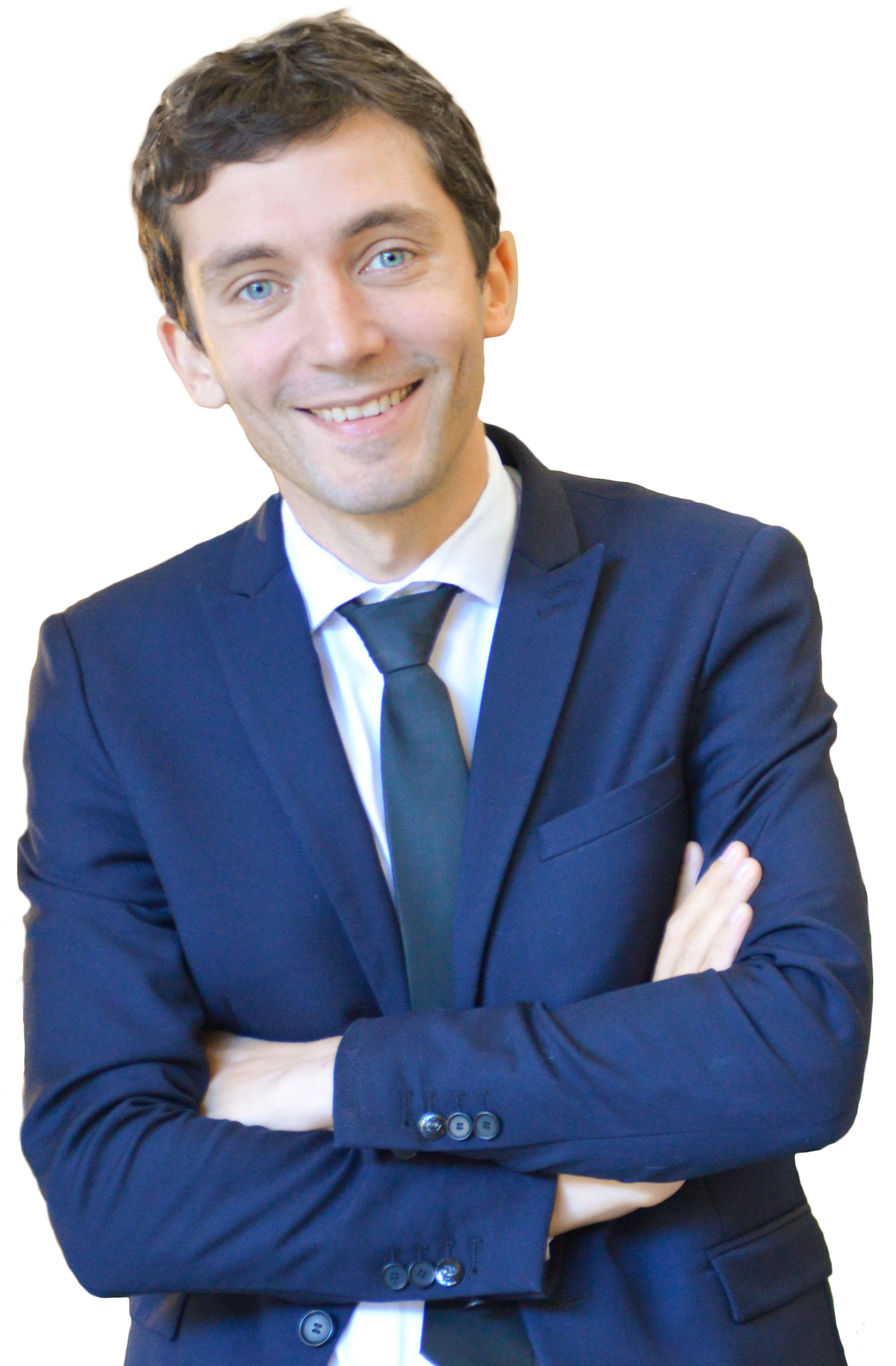 Julien SANCHEZ en 2016